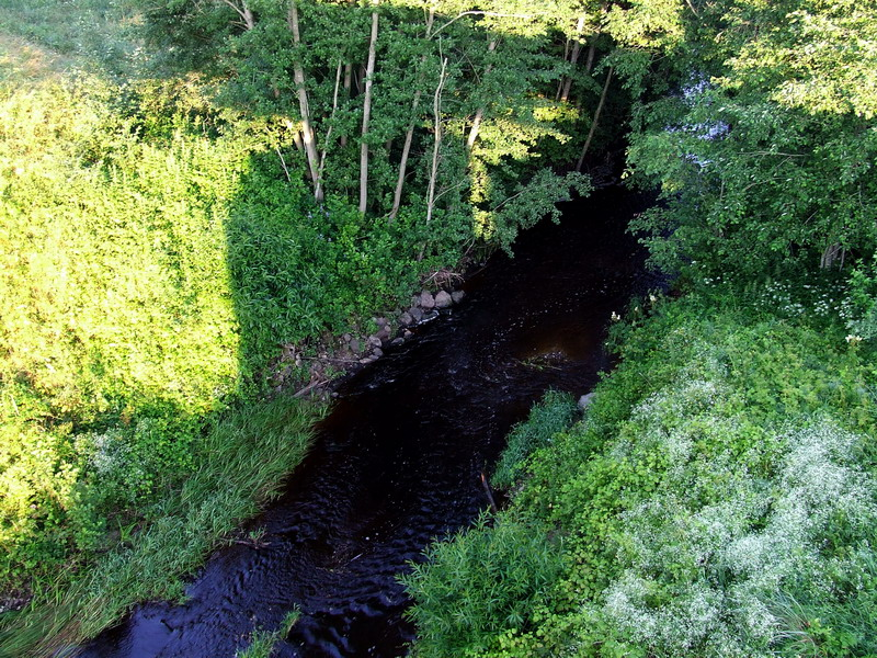 Šešuva ties Kalnėnais.